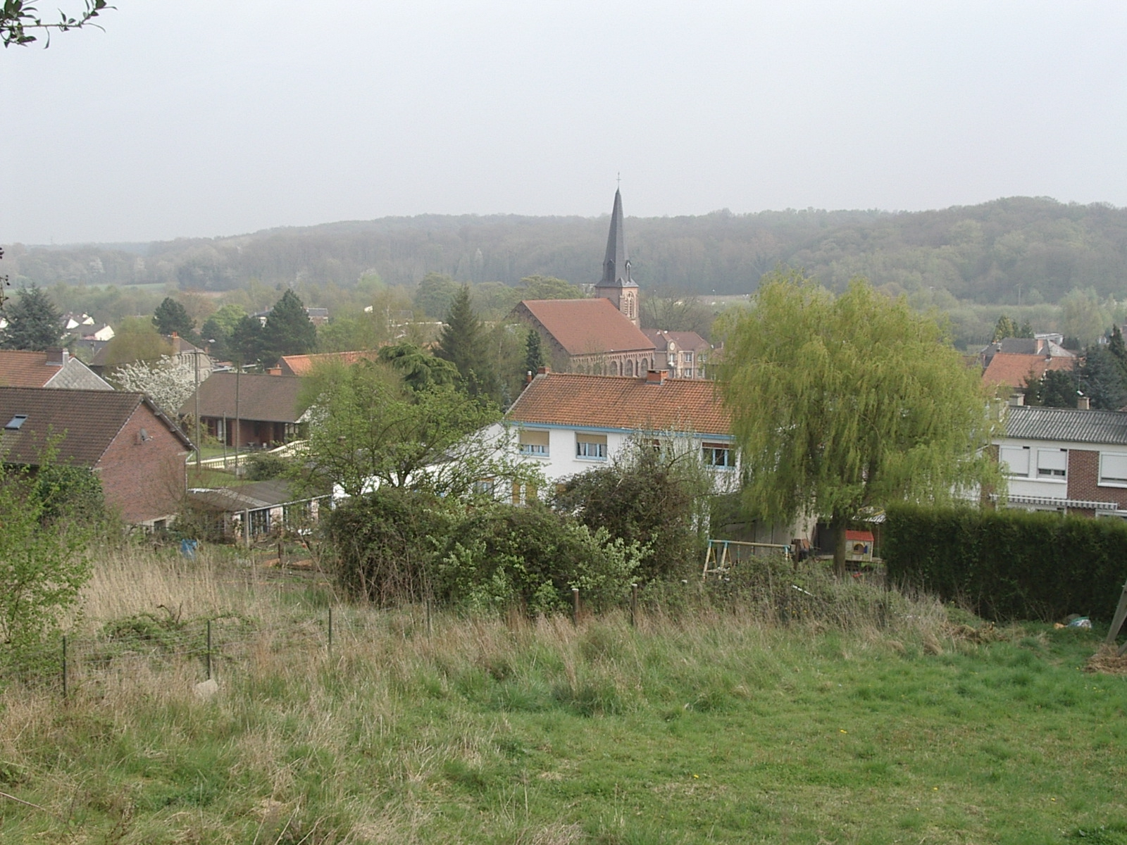 Village de Lapugnoy (62)